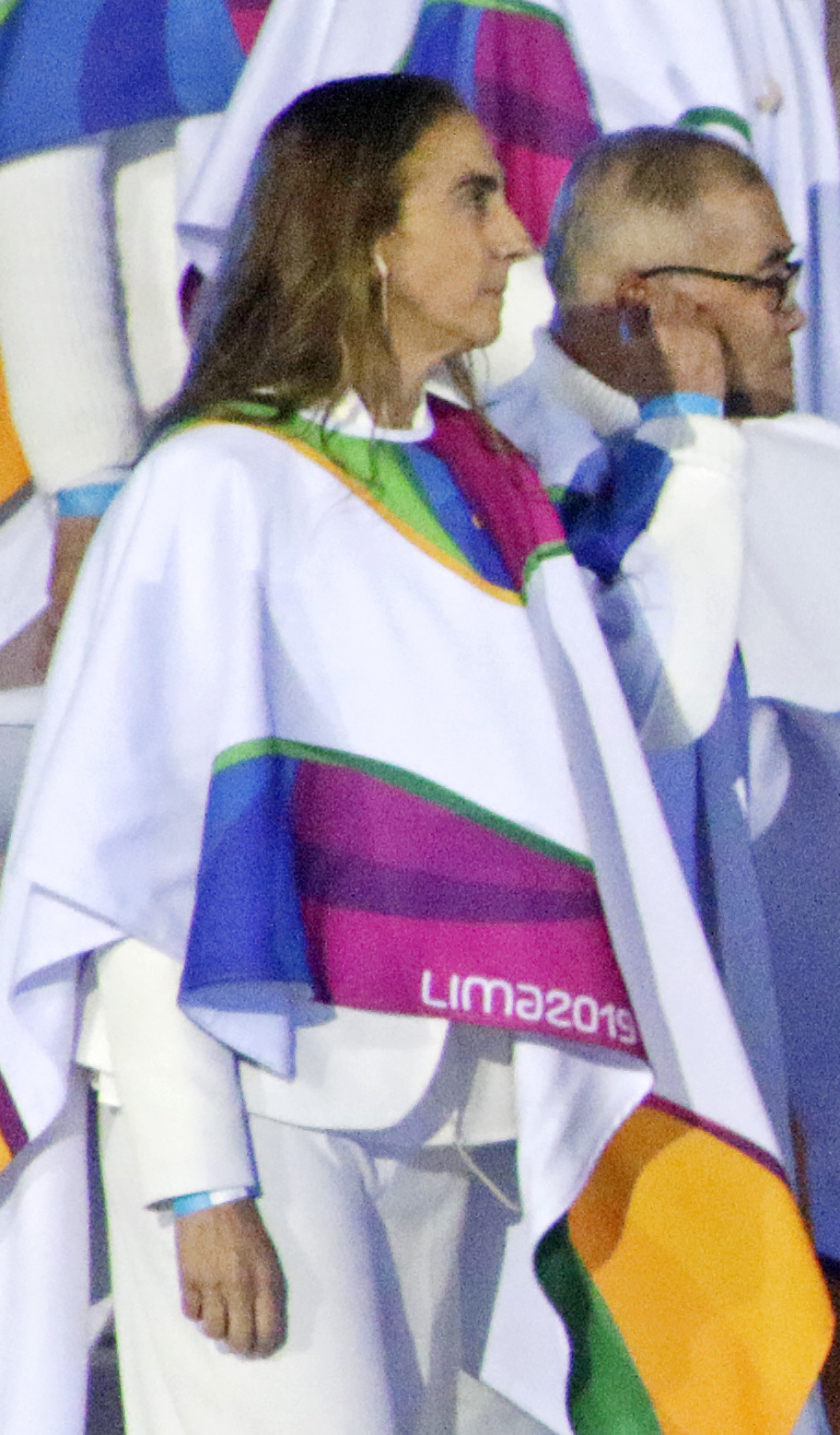 Ceremonia de inauguración de los Juegos Panamericanos Lima 2019